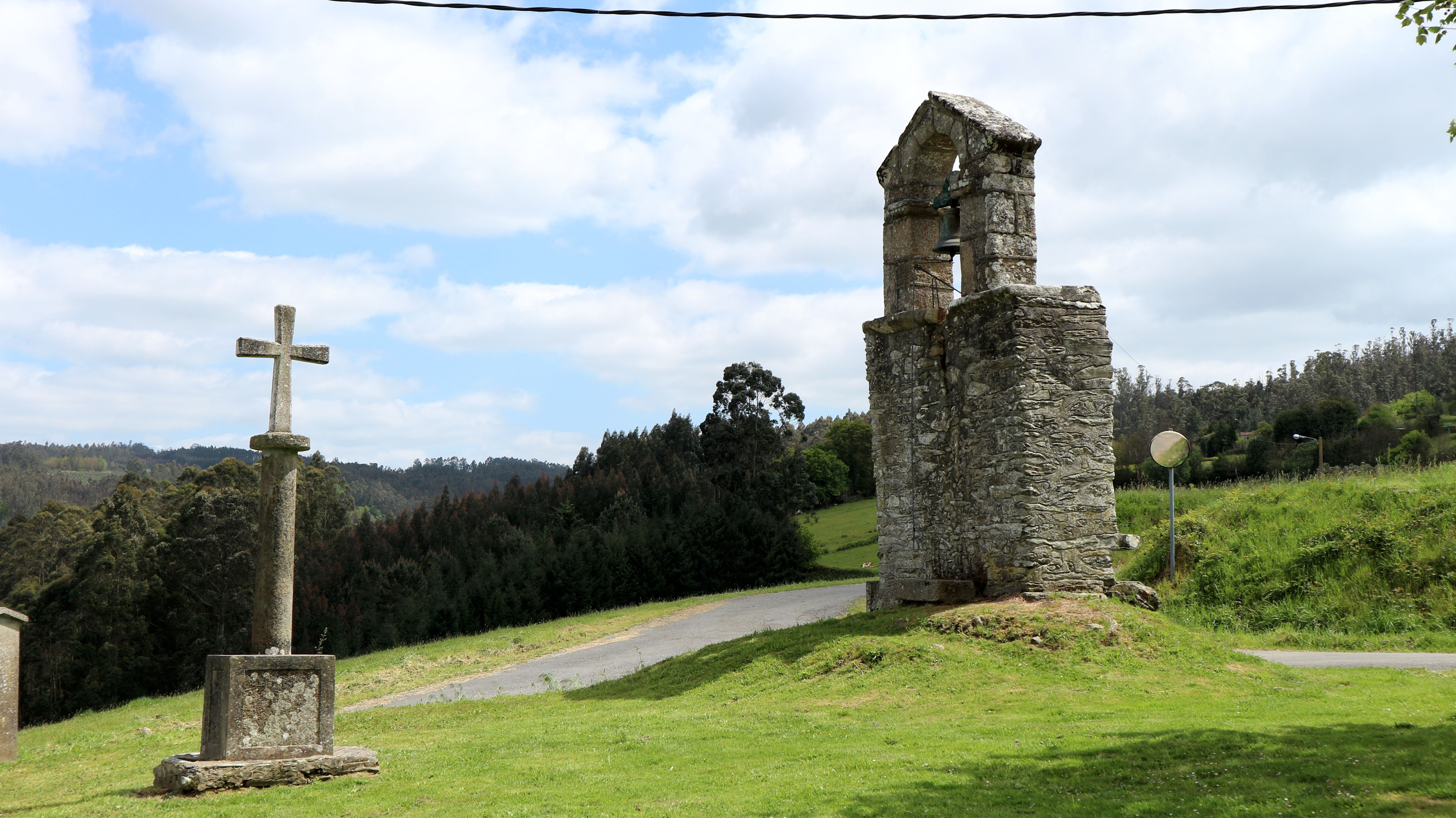 Campá e cruceiro. Paderne, Oza-Cesuras.